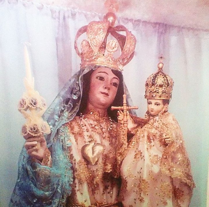 Imagen de la Santa Patrona, La Virgen de la Candelaria venerada en Coyoacán, Ciudad de México